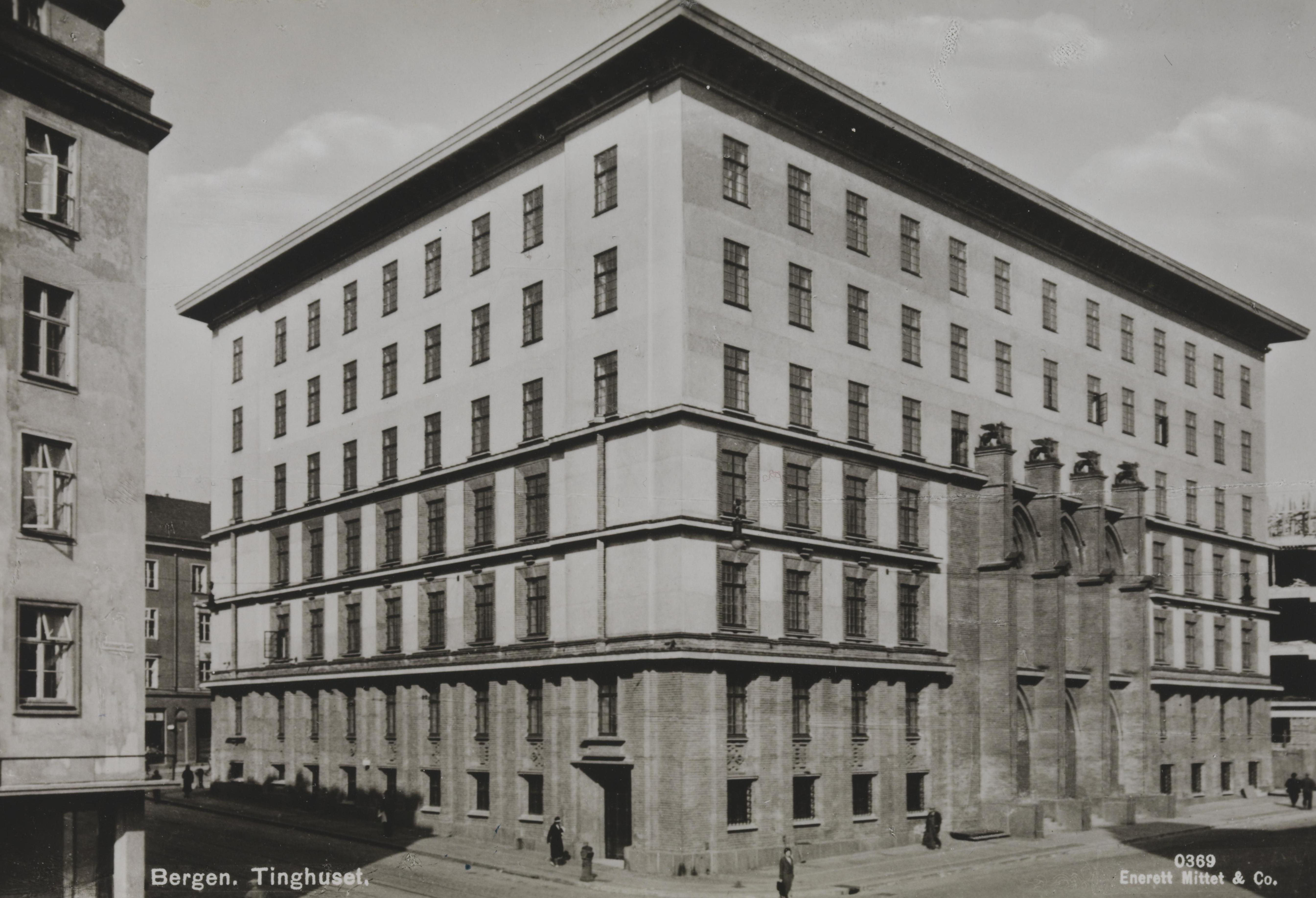 Bildet er hentet fra Nasjonalbibliotekets bildesamling Bergen, Hordaland